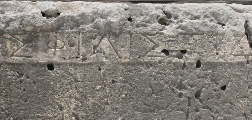 Originaria scrizione in lingua greca al teatro greco di Siracusa